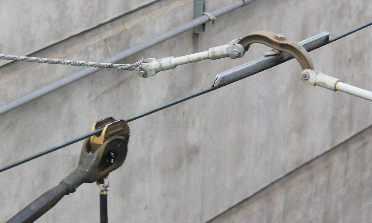 Détail du frotteur d’un tramway de Toronto.